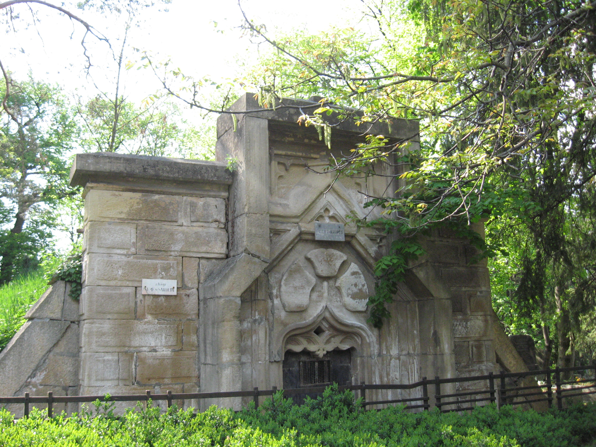 Házsongárdi temető: Paget-kripta 134